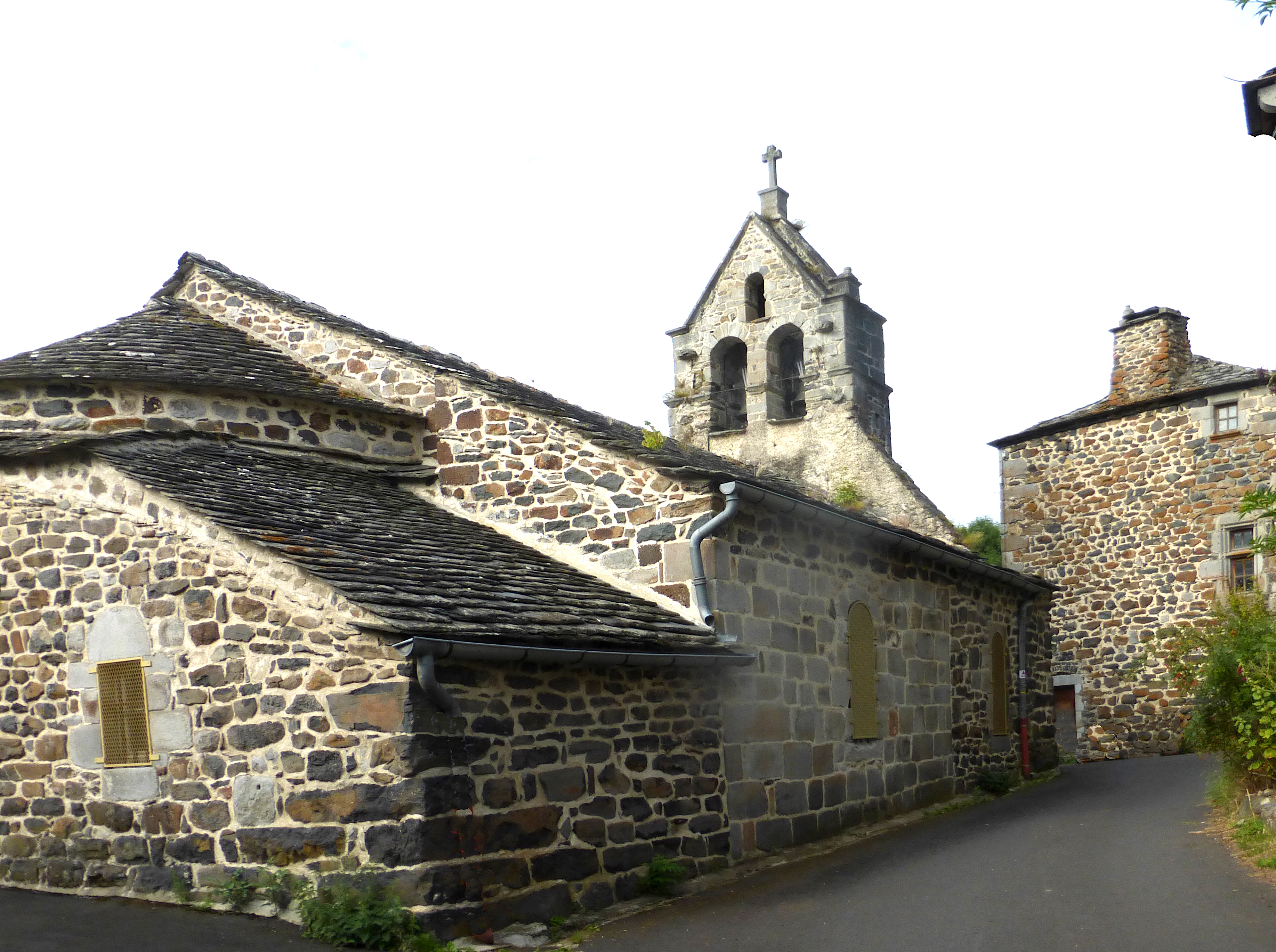 L'église Montusclat (Haute-Loire) Août 2017